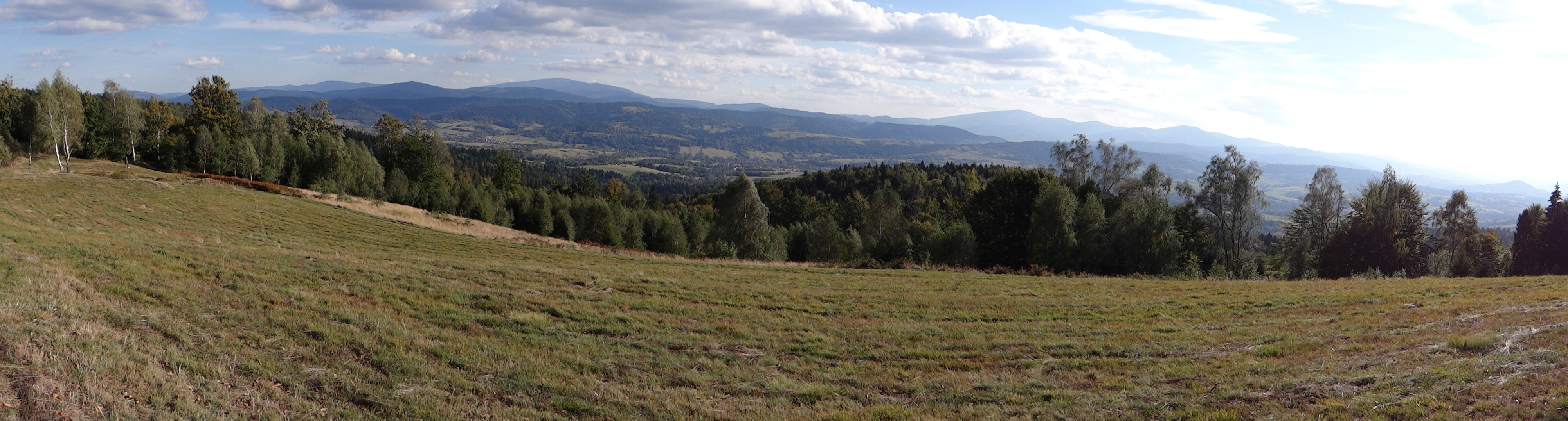 Panorama widokowa z polany na Ścieszków Groniu